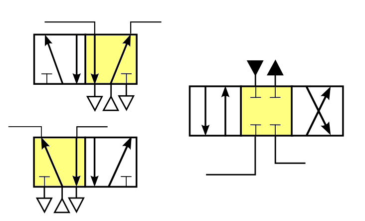 modèles courant de distributeurs. Models of pneumatics or hydraulics distributors